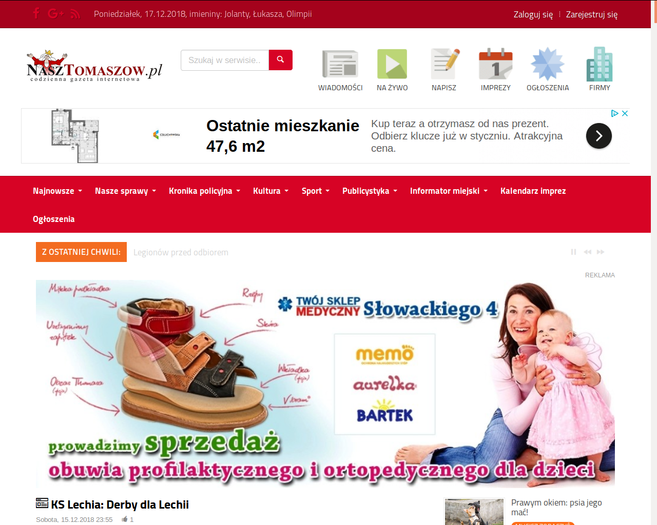 Strona główna najpopularniejszego potralu informacyjnego w 60-tysięcznym Tomaszowie Mazowiecki - "Nasz Tomaszów"